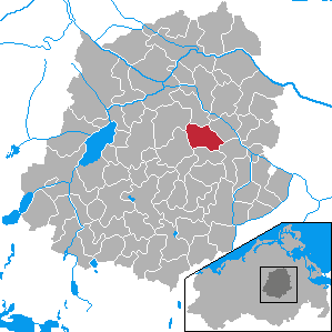 Hohenmocker, Landkreis Demmin, Mecklenburg-Vorpommern